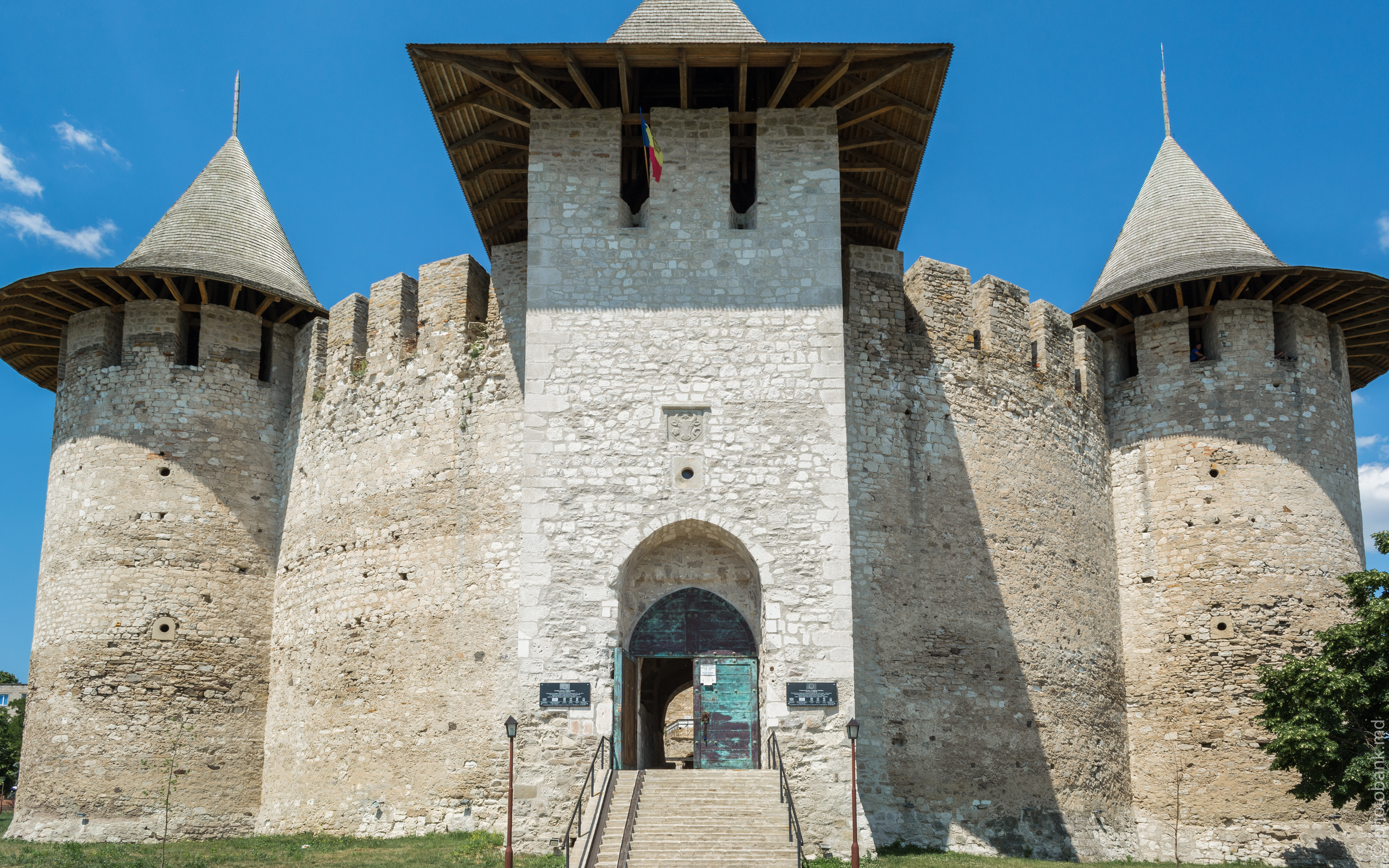 Сорокская крепость / Cetatea Soroca / Soroca Fortress